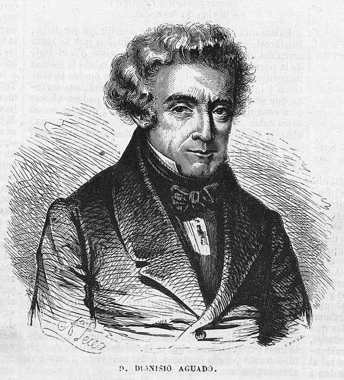 Dionisio Aguado, en la revista española El Museo Universal.